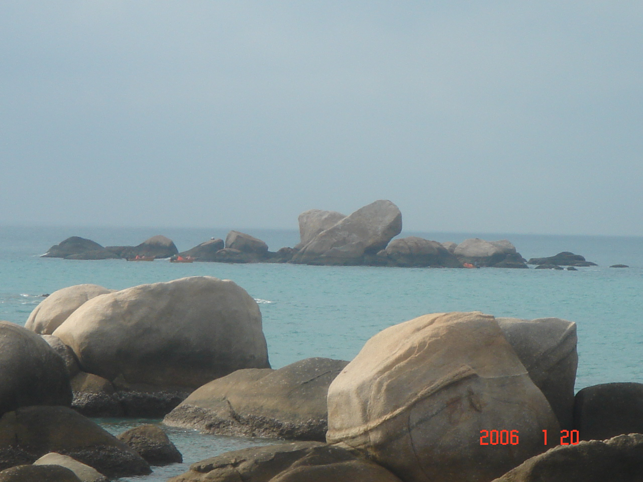 日月石，位于中国海南省三亚市天涯海角风景旅游区内